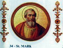 Pope Marcus